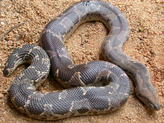 Russell's Boa Eryx conicus